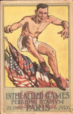 Affiche des Jeux interalliés, Stade Pershing à Paris (juin 1919)